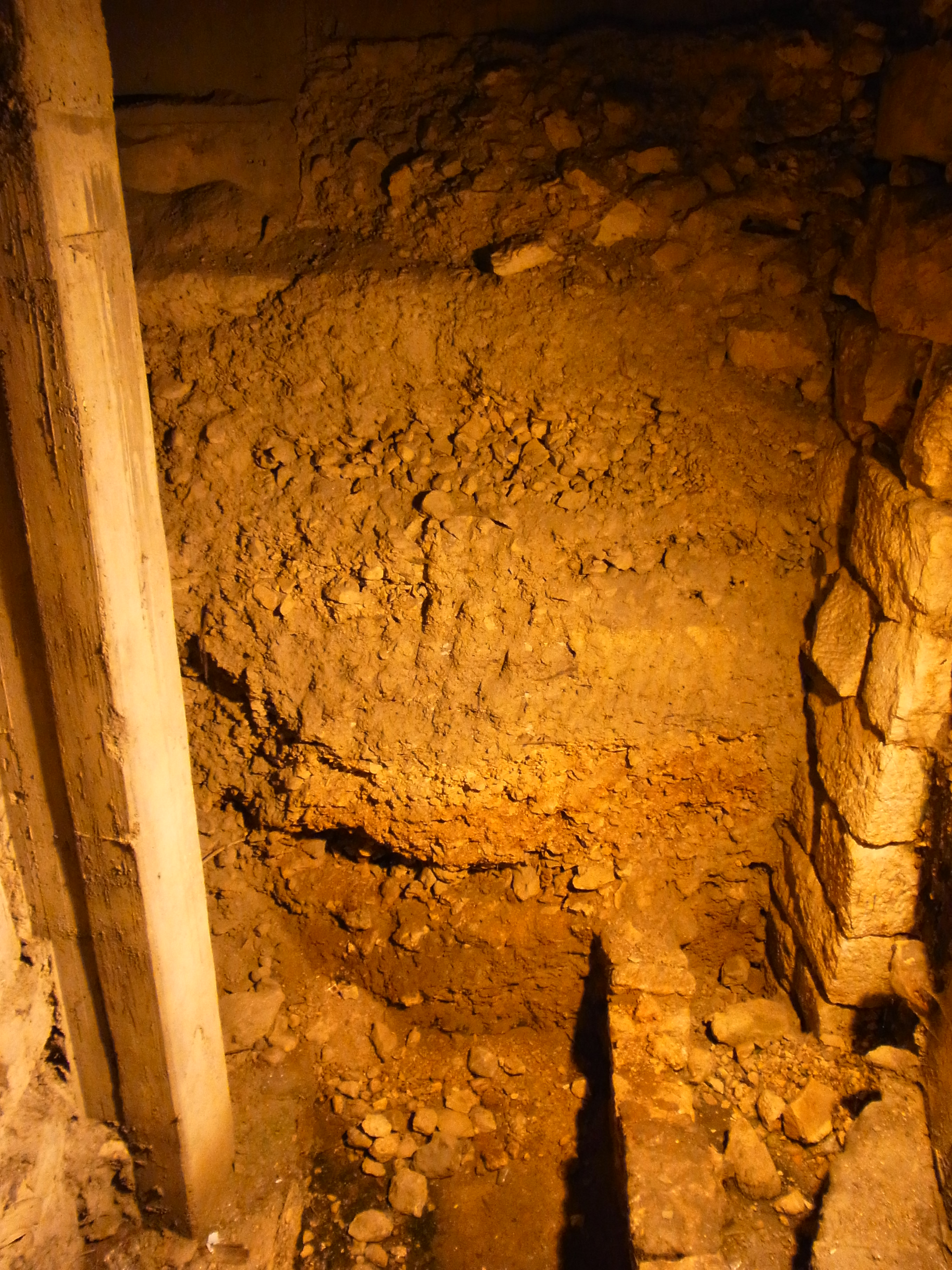 中文（香港）: 耶路撒冷城之建築遺跡